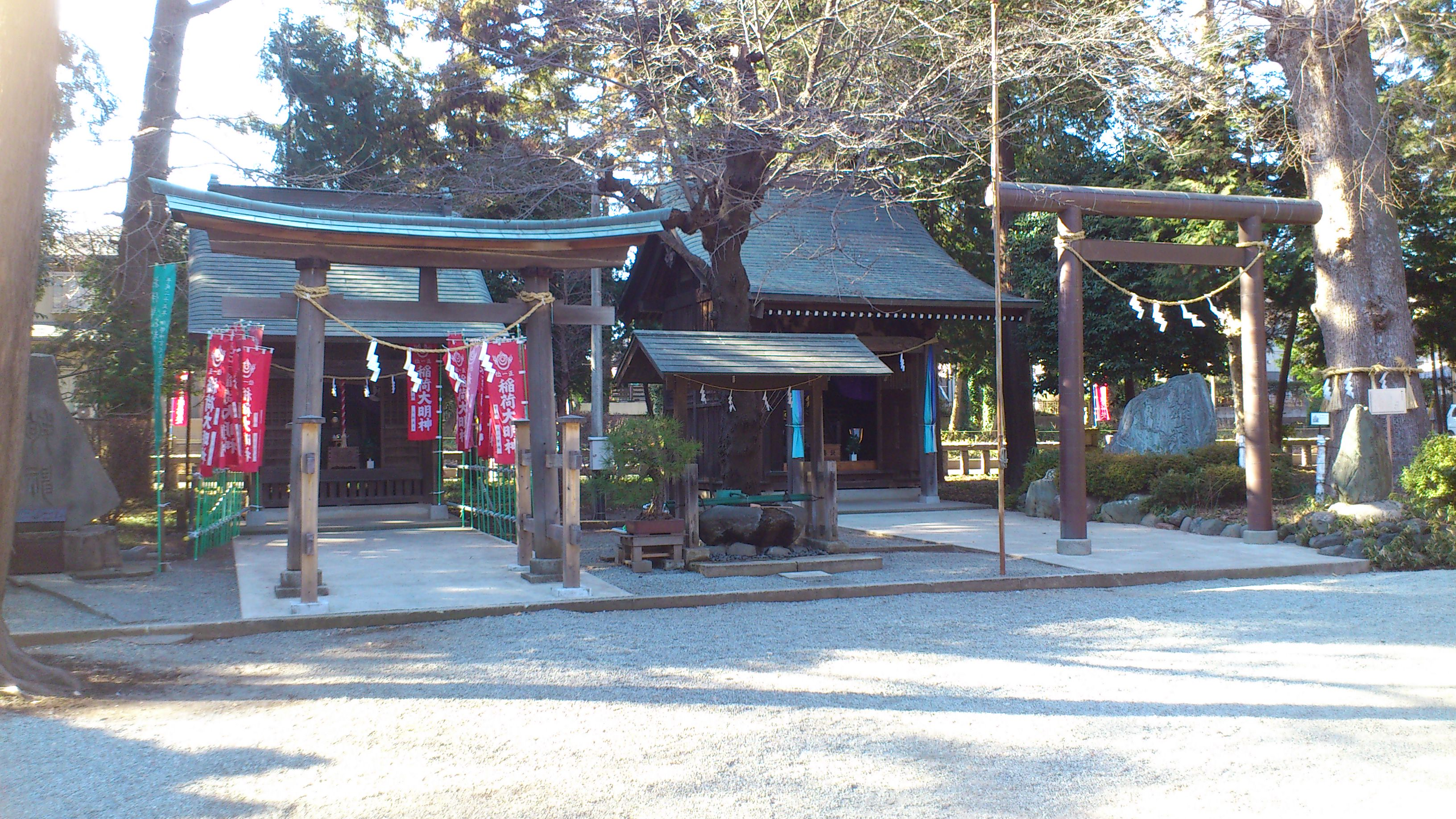 神奈川県大和市の深見神社境内、拝殿の西側で並ぶ御倉稲荷神社と靖國社。